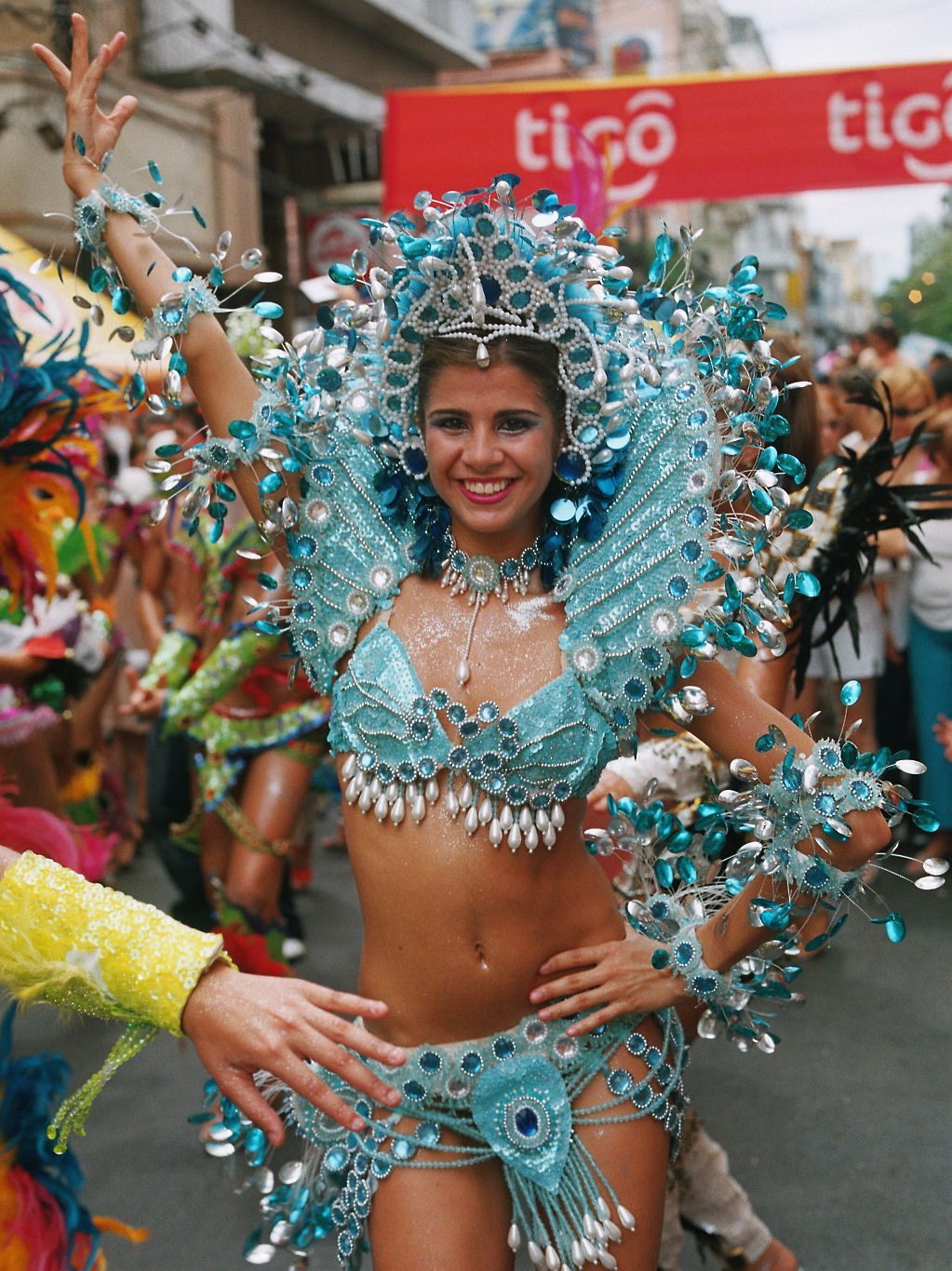 Samba dancer from Encarnación, Paraguay